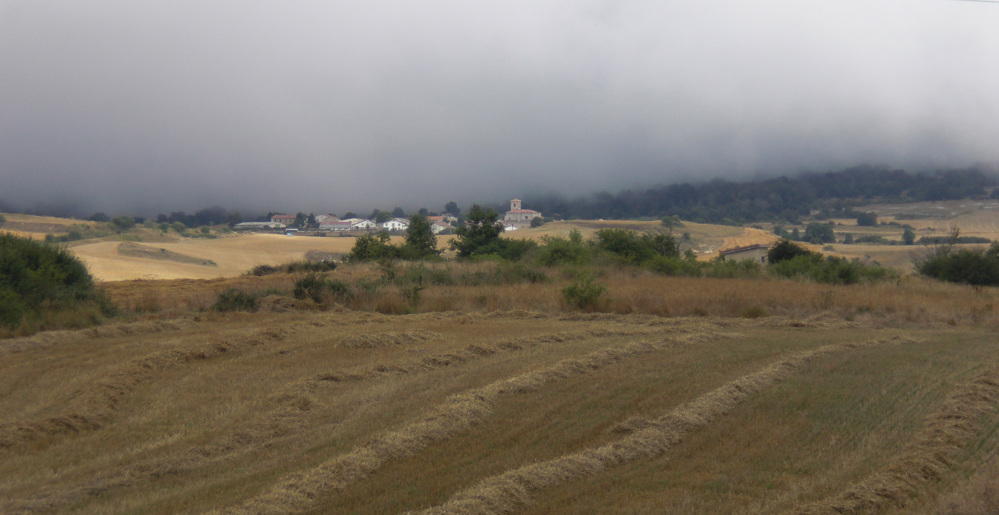 Erroeta Erroitegitik ikusita